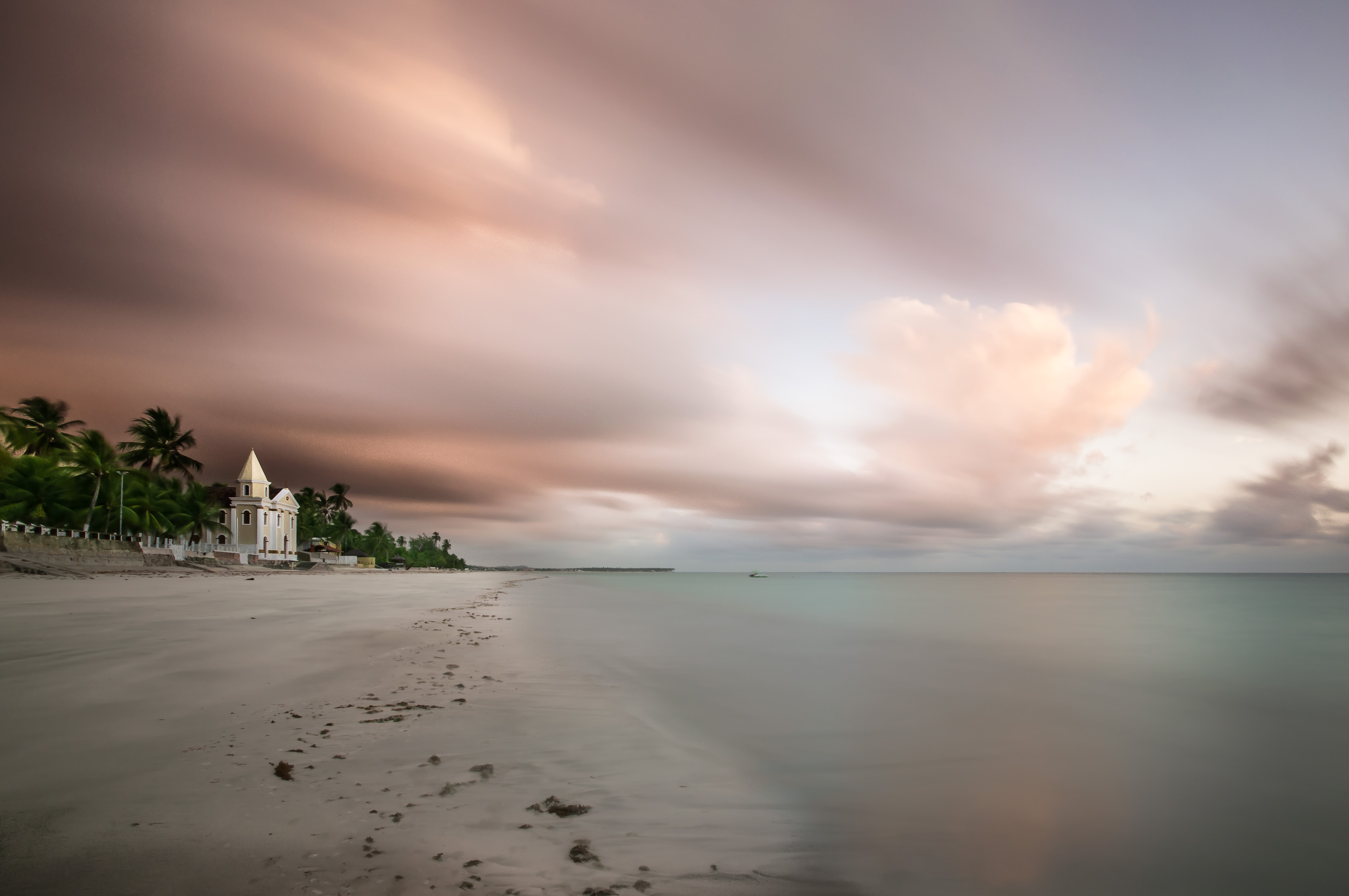 Igreja de São Pedro - Tamandaré Cultural property Forte de Santo Inácio de Tamandaré, Tamandaré, Pernambuco, Brazil Q10283947, P727:, SIPA ID: 11865 iPatrimônio ID: tamandare-fortaleza-de-santo-inacio-de-tamandare-forte-de-tamandare